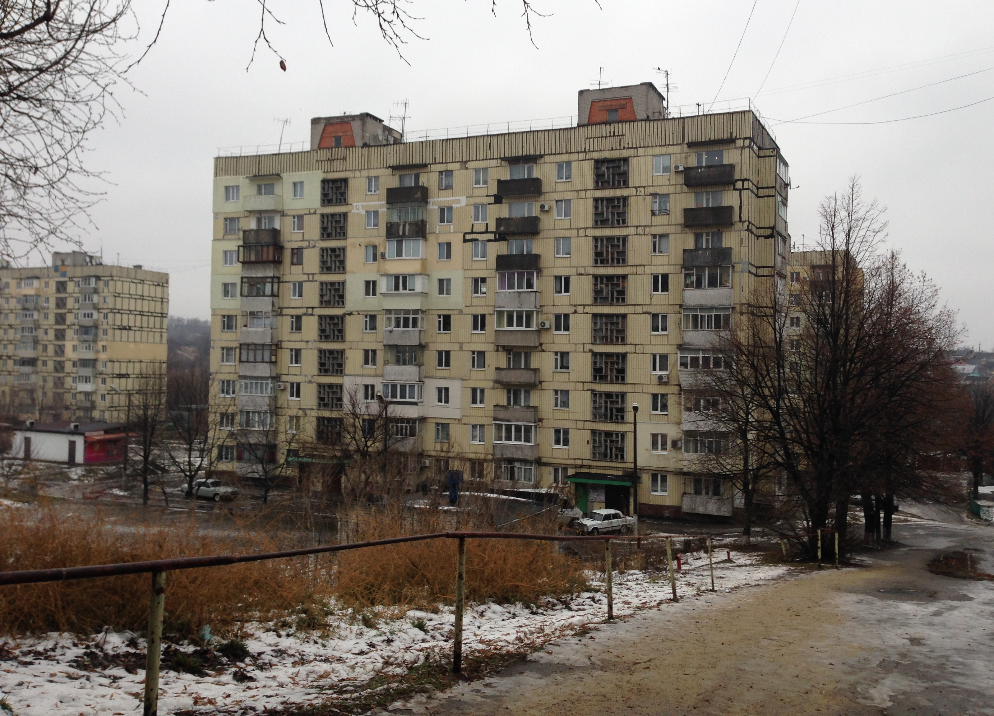 Дом на территории ж/м Кротова (г. Днепр, ул. Данилы Нечая, д. 17)